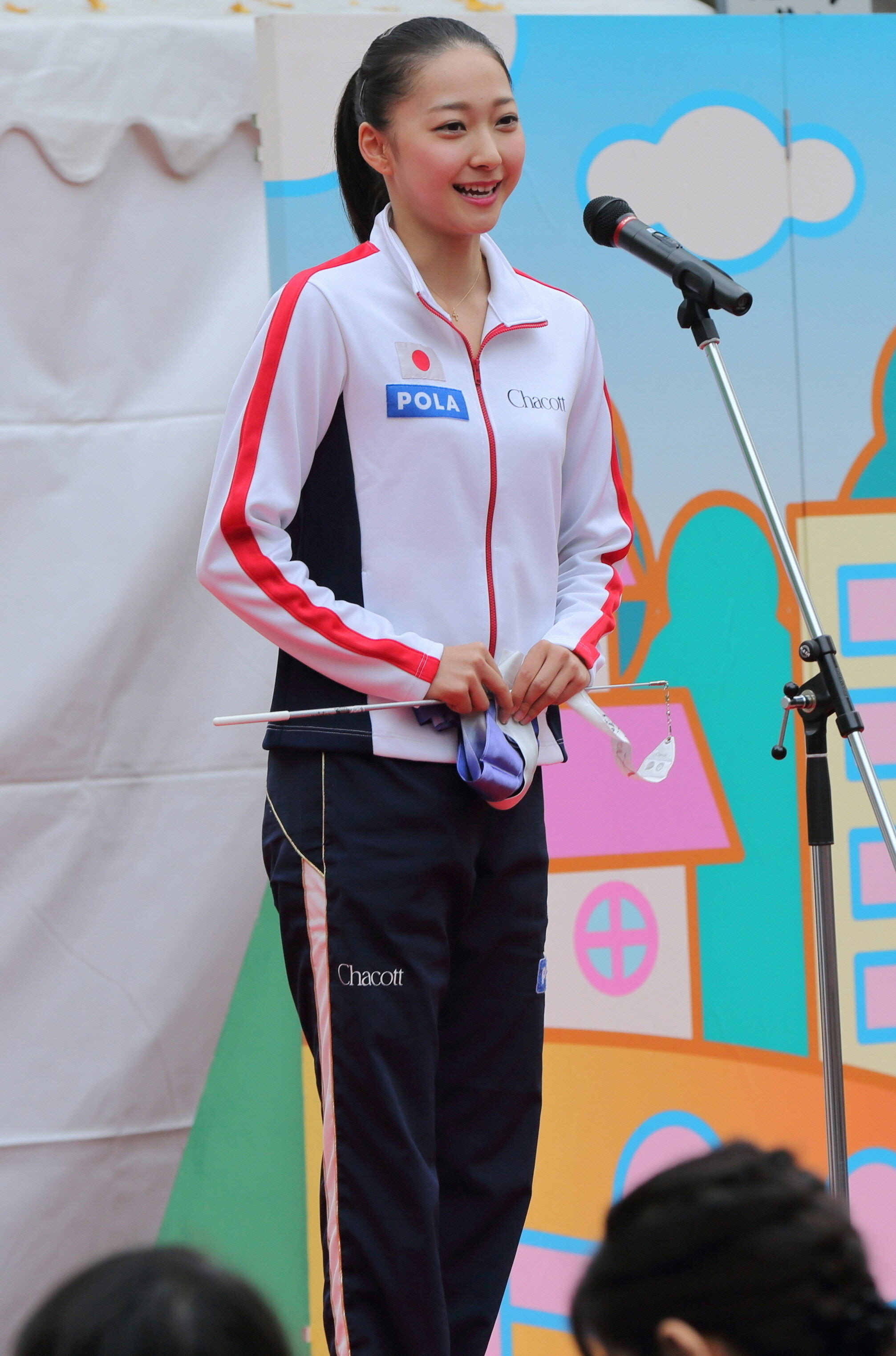 ハローキティストリート・しまじろう広場誕生1周年記念ダブルアニバーサリーイベント